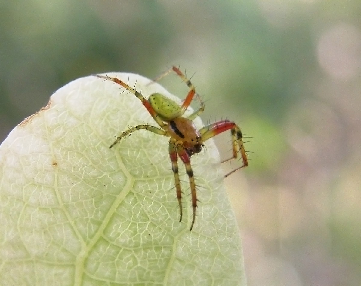 Araniella opisthographa, gehört zur Gattung der Kürbisspinne. Eigene Aufnahme CoolPix 5700, ISO 400, f/5,6, 1/125s